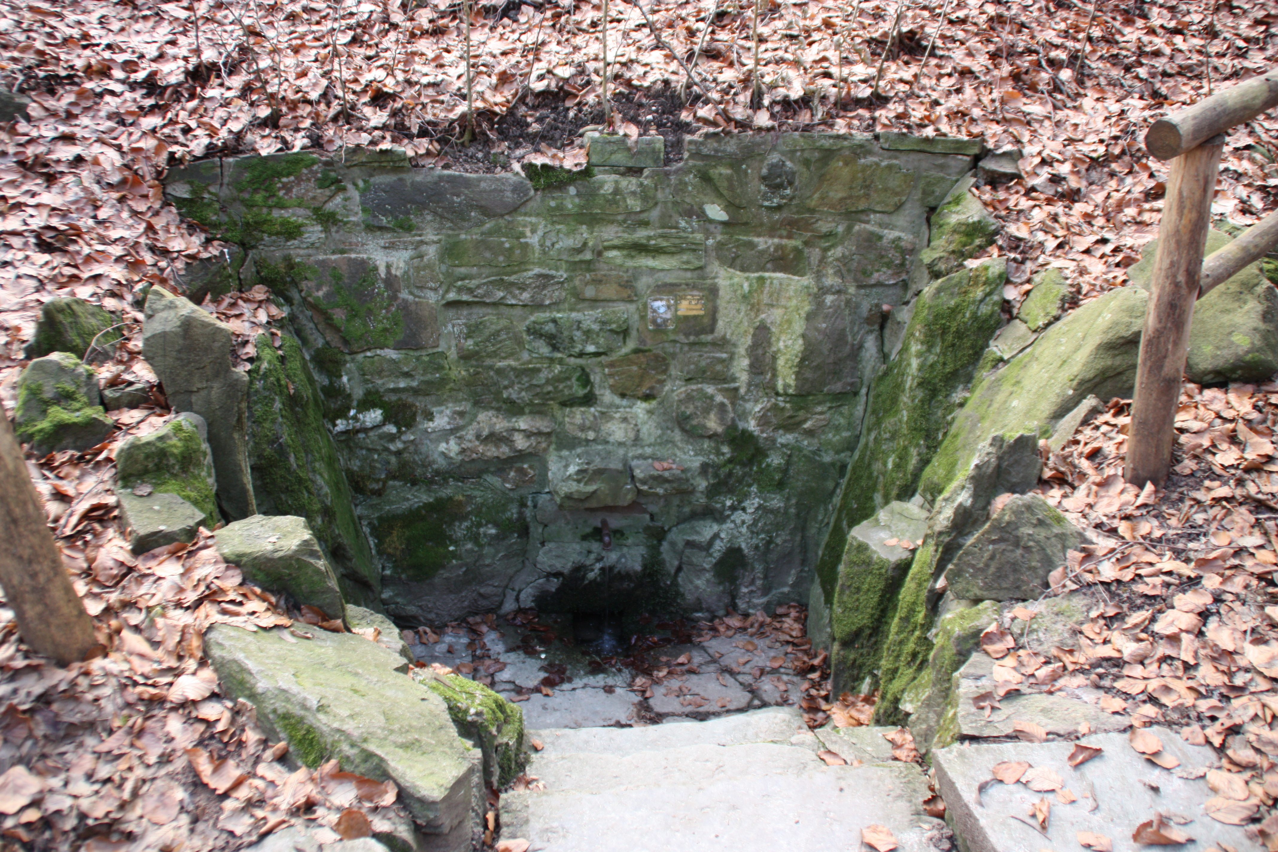 Quelle an der Leichtweißhöhle in Wiesbaden, Hessen, Deutschland